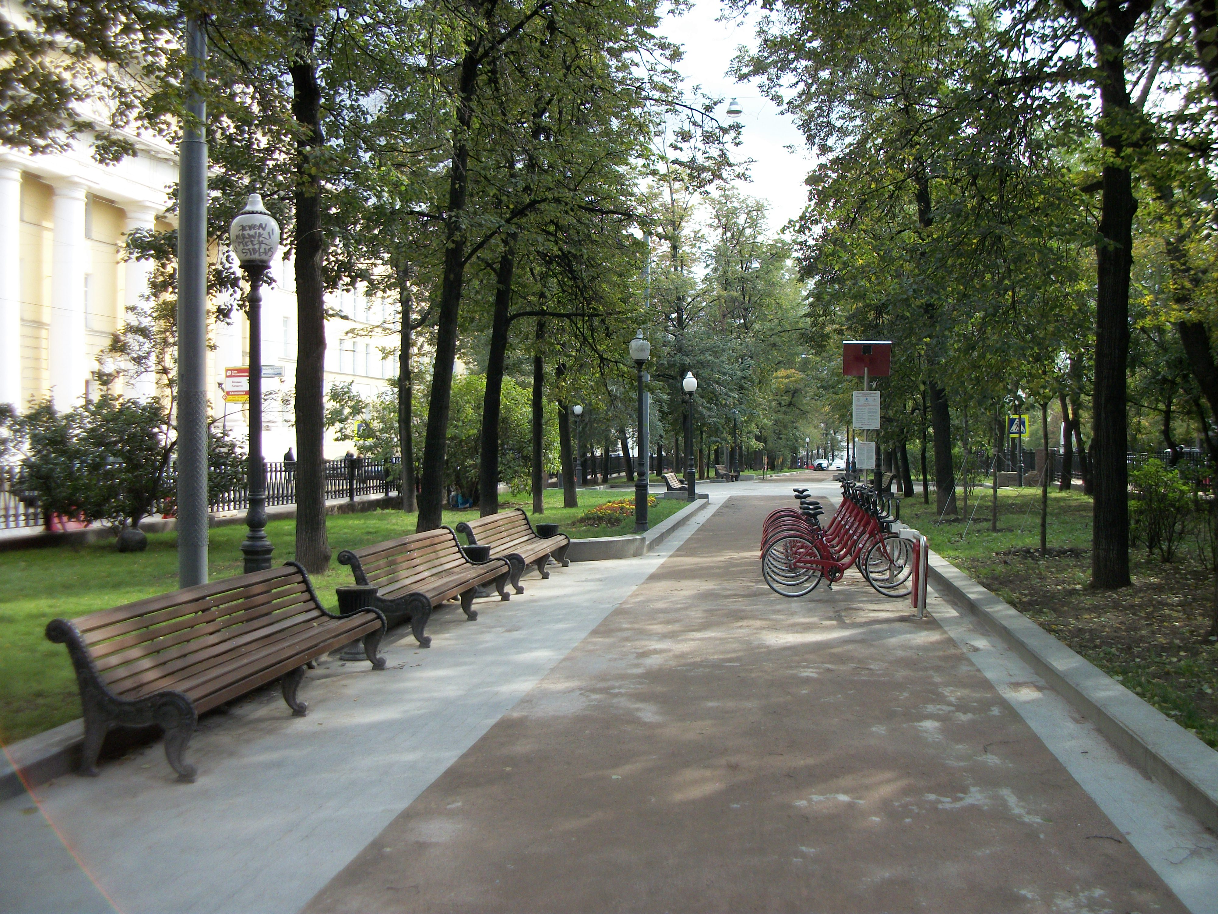 Покровский бульвар (Москва и Московская область, Москва, Покровский бульв.)